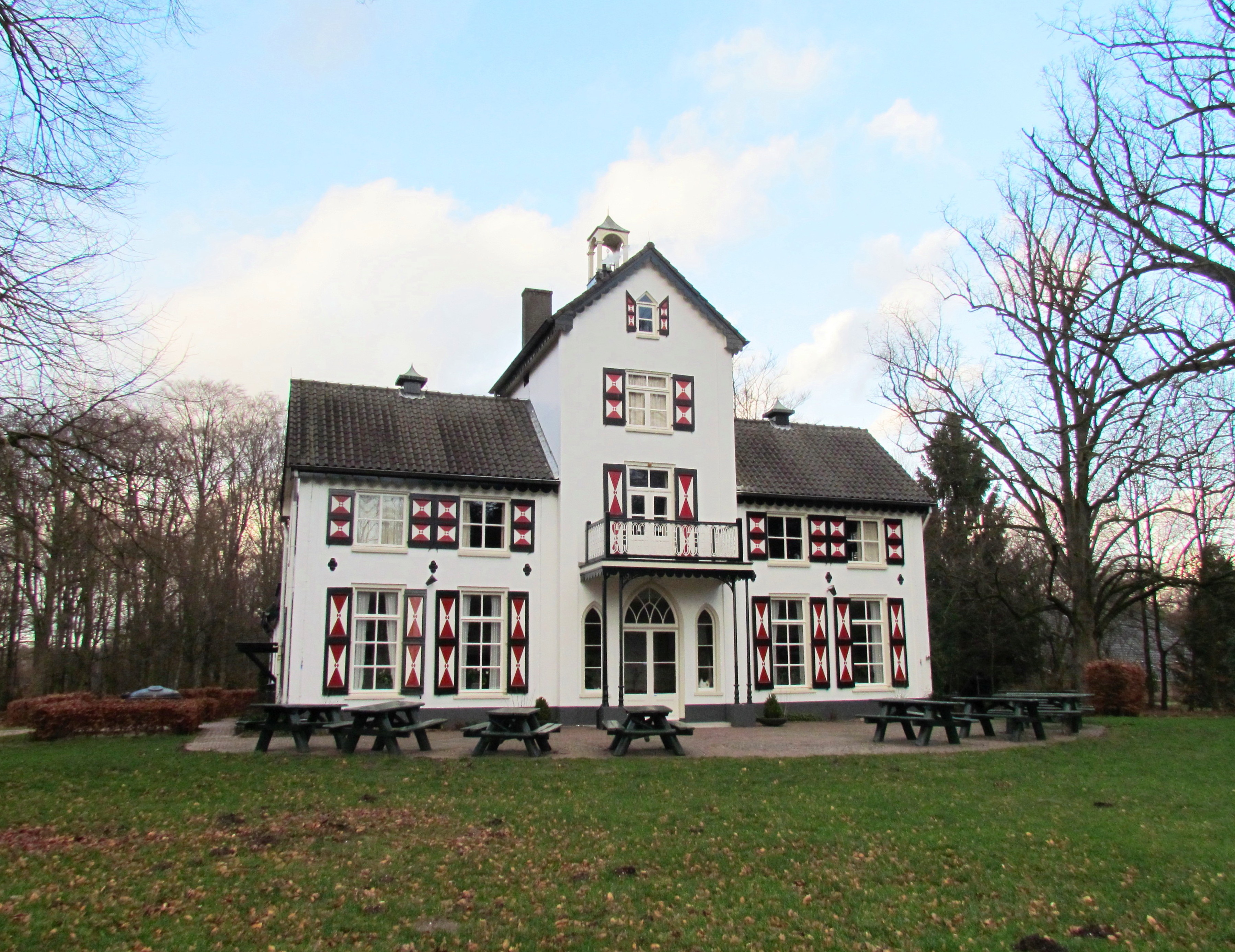 Het Woldhuis, 'Veldwerkcentrum' aan het Woldhuis 11 te Apeldoorn (NL)